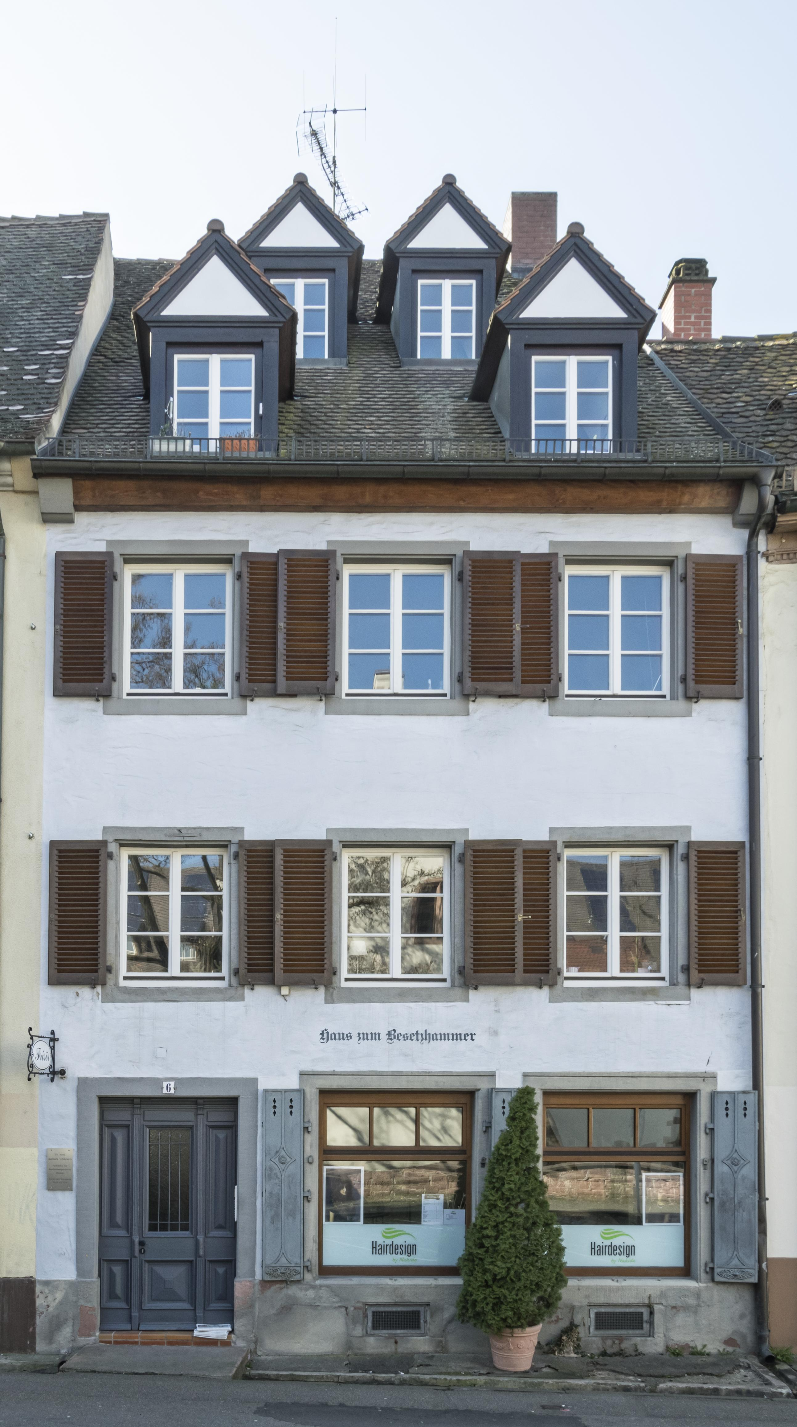 Bilder aus Freiburg Haus zum Besetzhammer